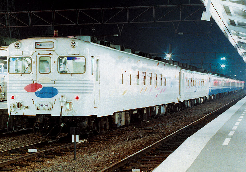 JR九州 キハ58 8002+キハ65 8001 「ふれあいGO」+JR四国キハ65売却車5両+キハ40 2128